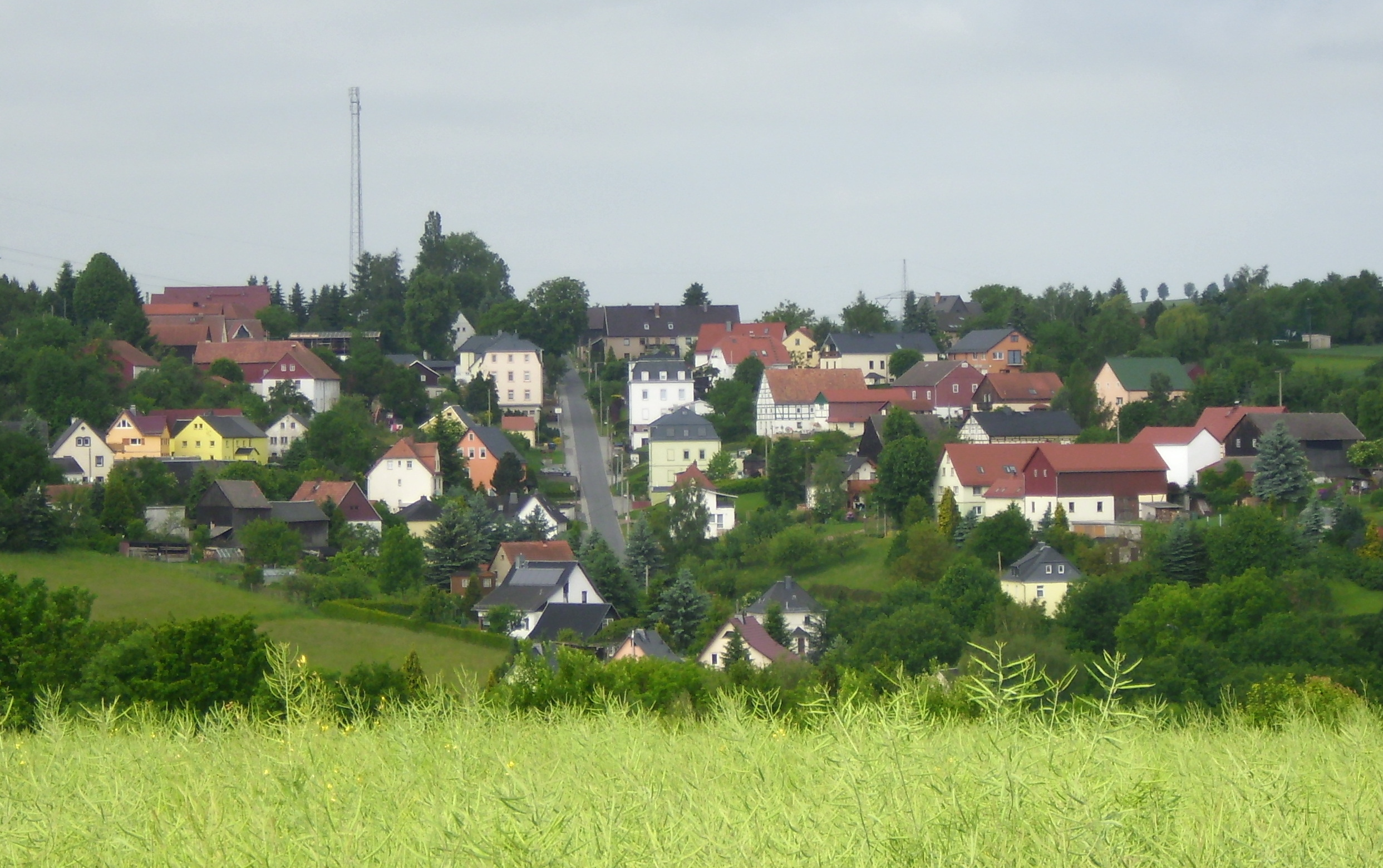 Der Blick vom Mühlweg bei Oelsa nach Spechtritz, einer Ortschaft die bei der Stadt Rabenau am Rabenauer Grund liegt.